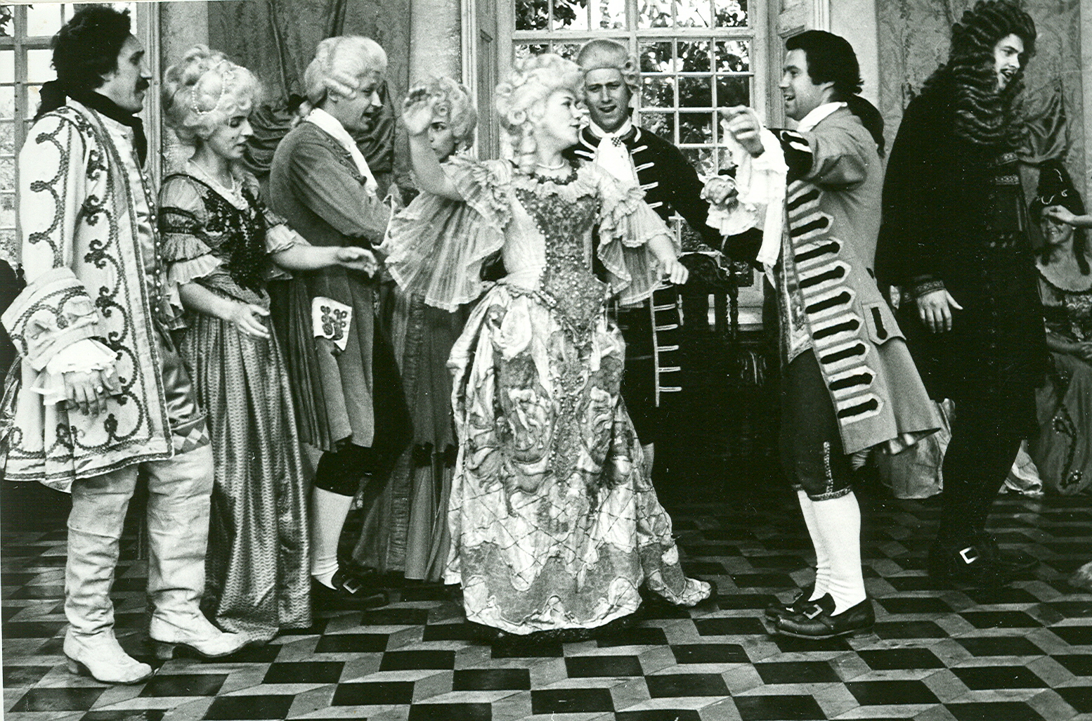 Д. Покровский и артисты его ансамбля в фильме «Аленький цветочек».